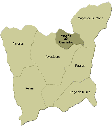 localisation de maças de caminho sur la freguesia de alvaiazere